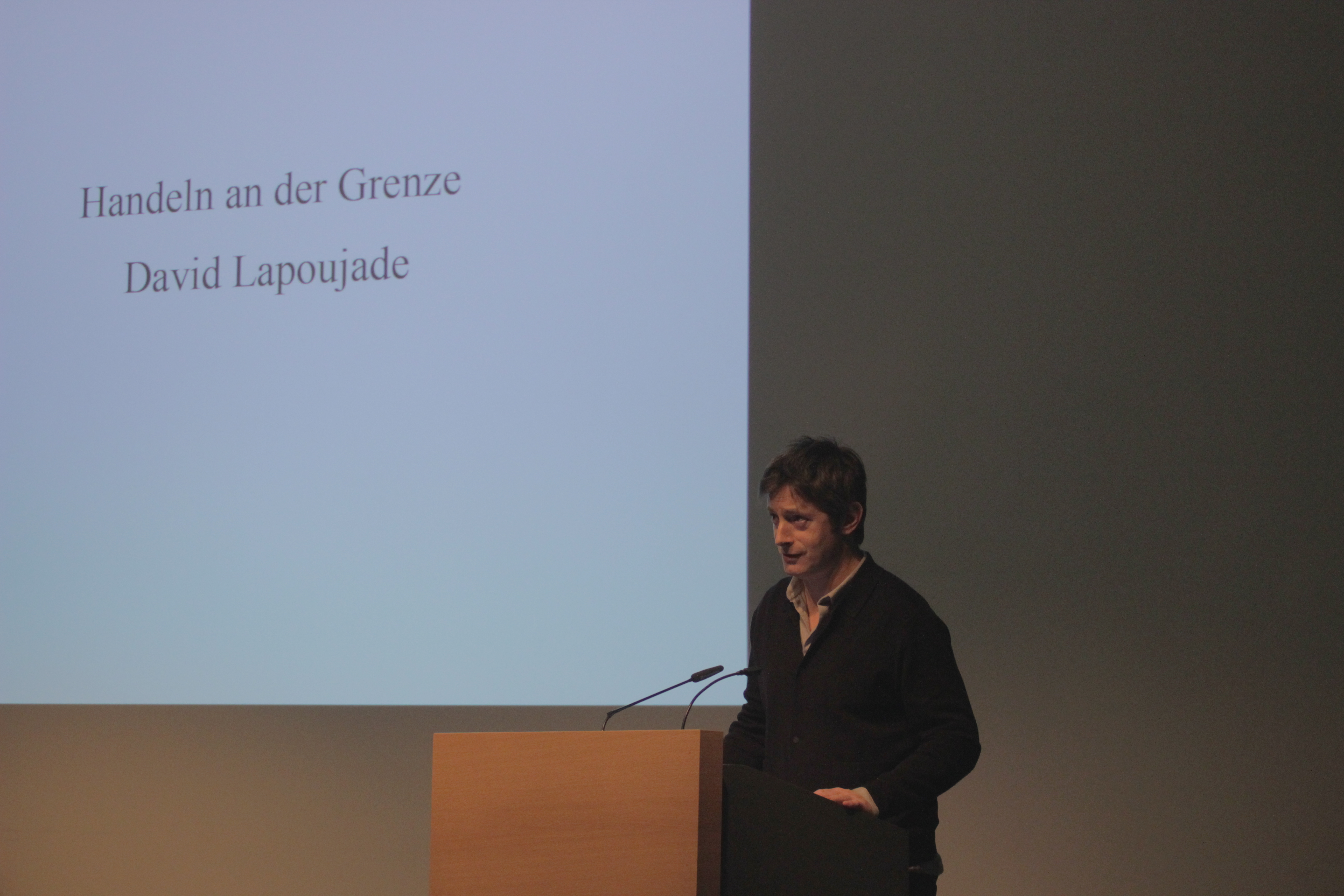 david lapoujade